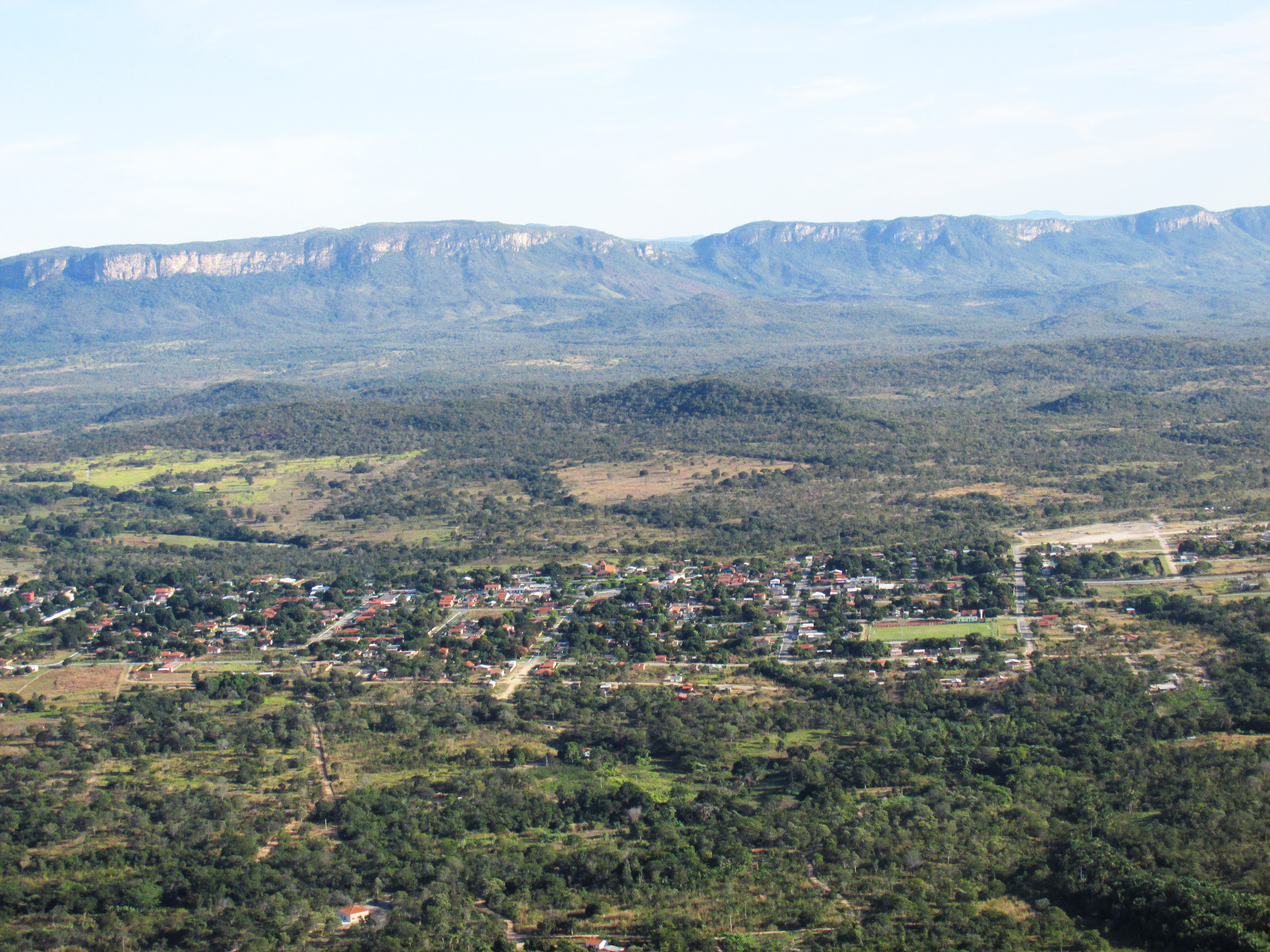 Vista Panorâmica da Cidade de Teresina de Goiás